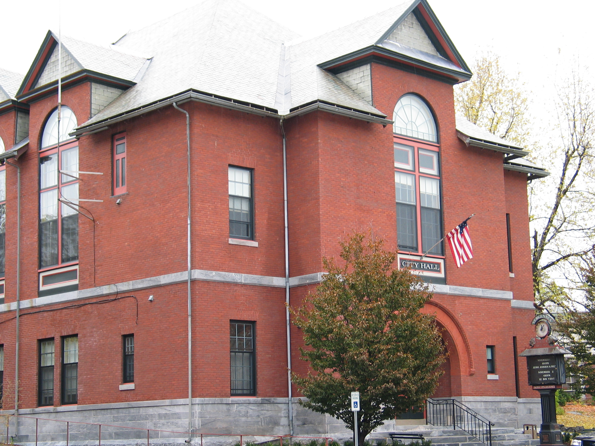 Town Hall, Vergennes, Vermont